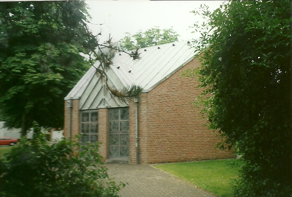 Innerhalb des Stadtbezirks Bedburg-West siedelten zahlreiche kleinere Ortschaften bei. Als Erinnerung an Buchholz errichtete man eine Nachfolgerkapelle für Sankt Antonius in Altbuchholz. Die Kapelle steht inmitten einer Grünanlage, für Messen wird sie nicht genutzt.